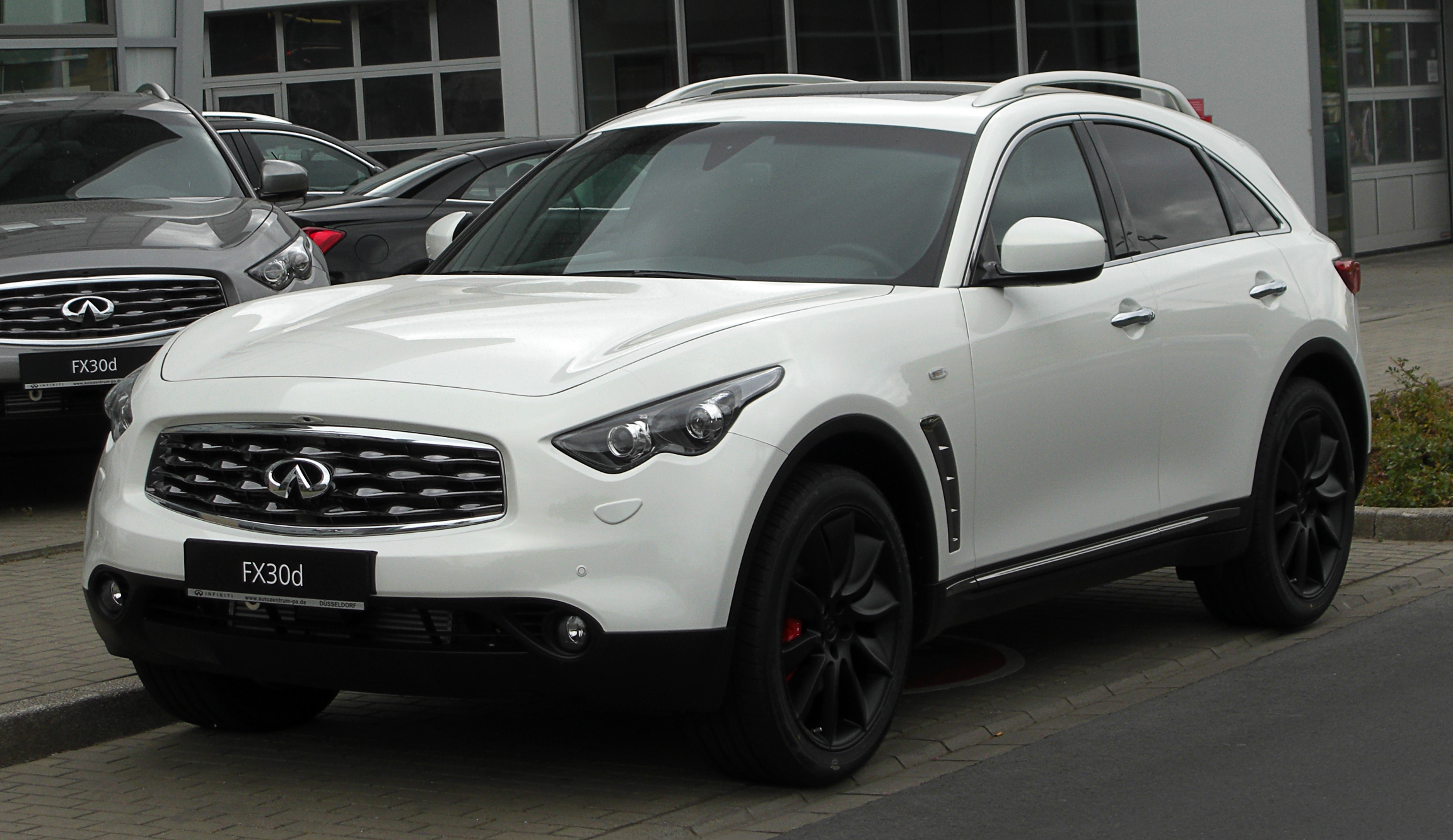 Infiniti FX30d S (S51)